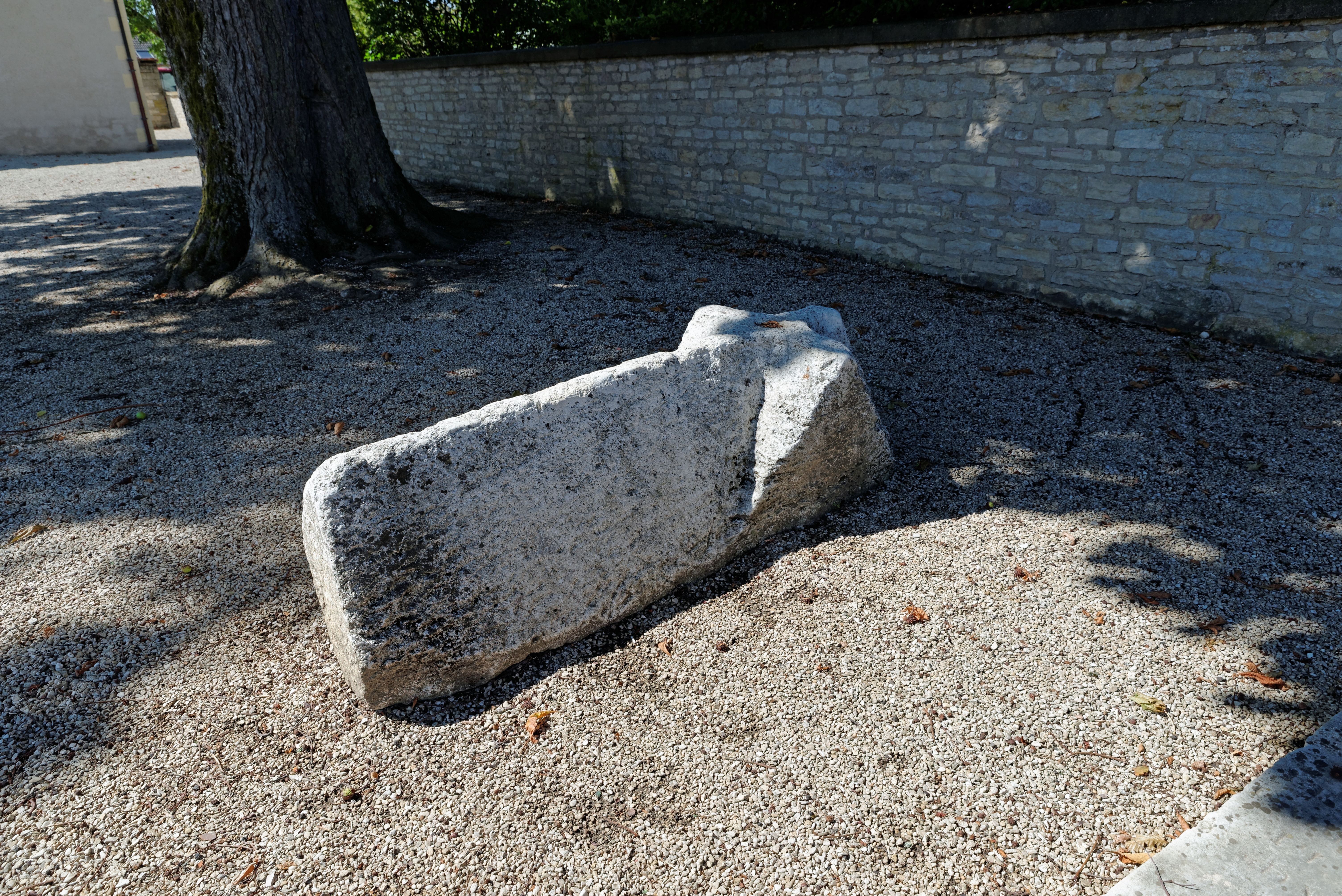 Croix bâtière auprès de l'église de Cessey-sur-Tille. (Côte d'Or, Bourgogne, France)